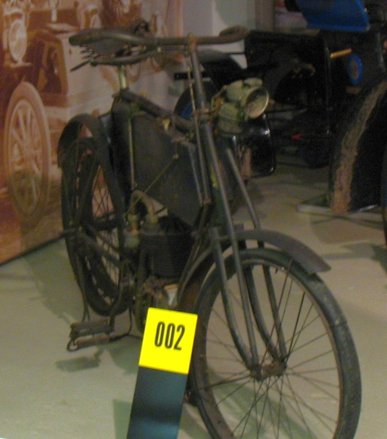 Erstes Motorrad von Seidel & Naumann